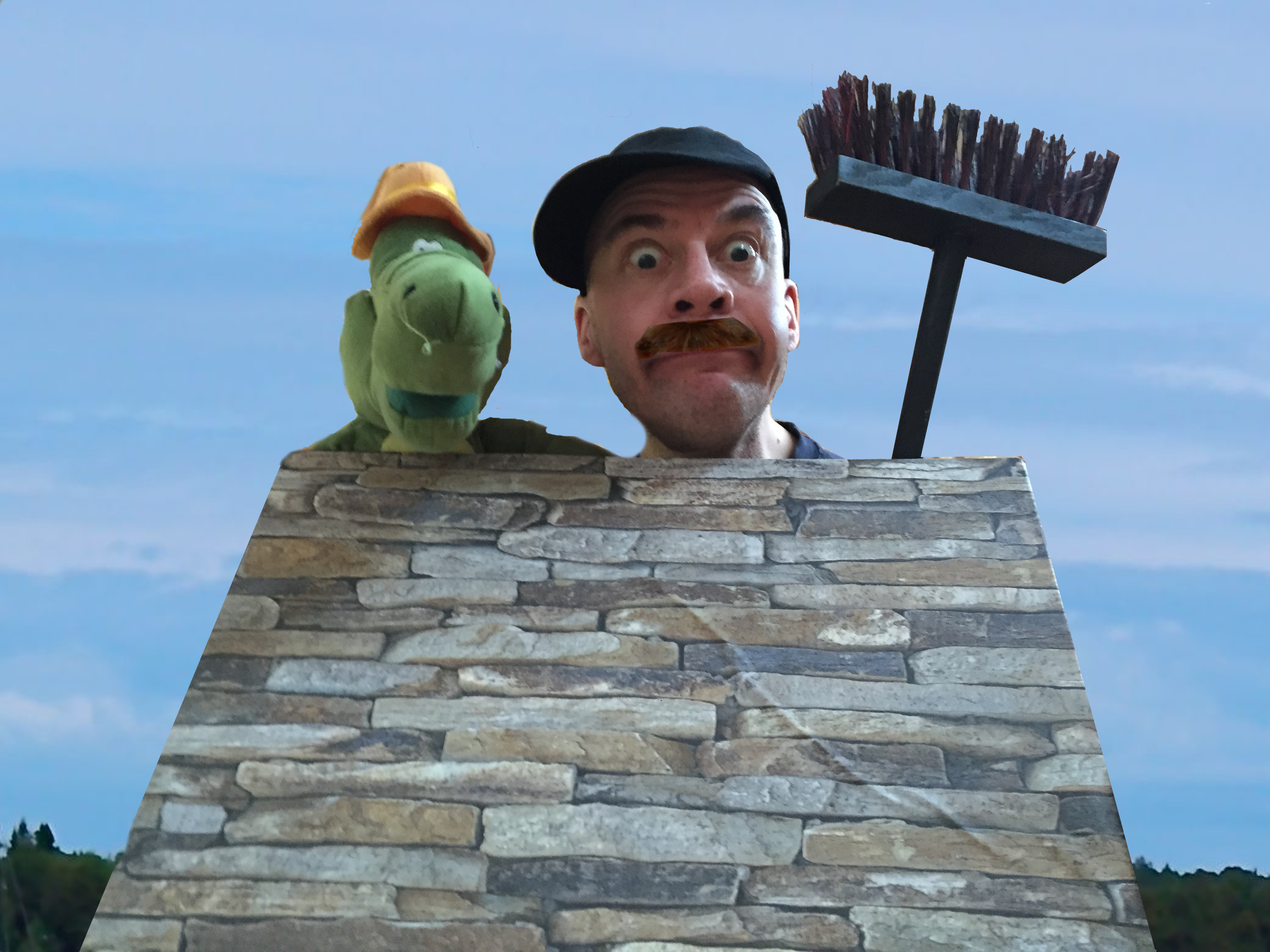 Torsten med borsten i egen hög person. Det är endast röken som fattas.